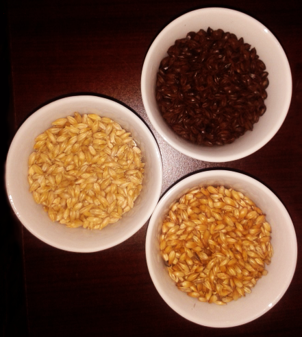 Granos de cebada utilizados en la elaboración de cerveza.A la izquierda, malta clara, a la derecha arriba, malta oscura, y la derecha abajo, malta caramelizada.